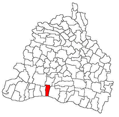 Amplasarea în cadrul județului.